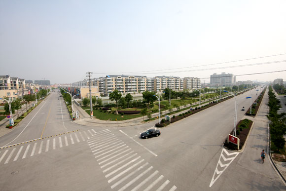 张浦海虹路(右)与学士路交叉口